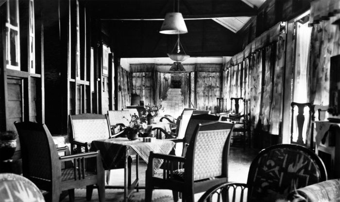 Foto. Interieur van Hotel "Hansje" in Sarangan, Oost-Java.